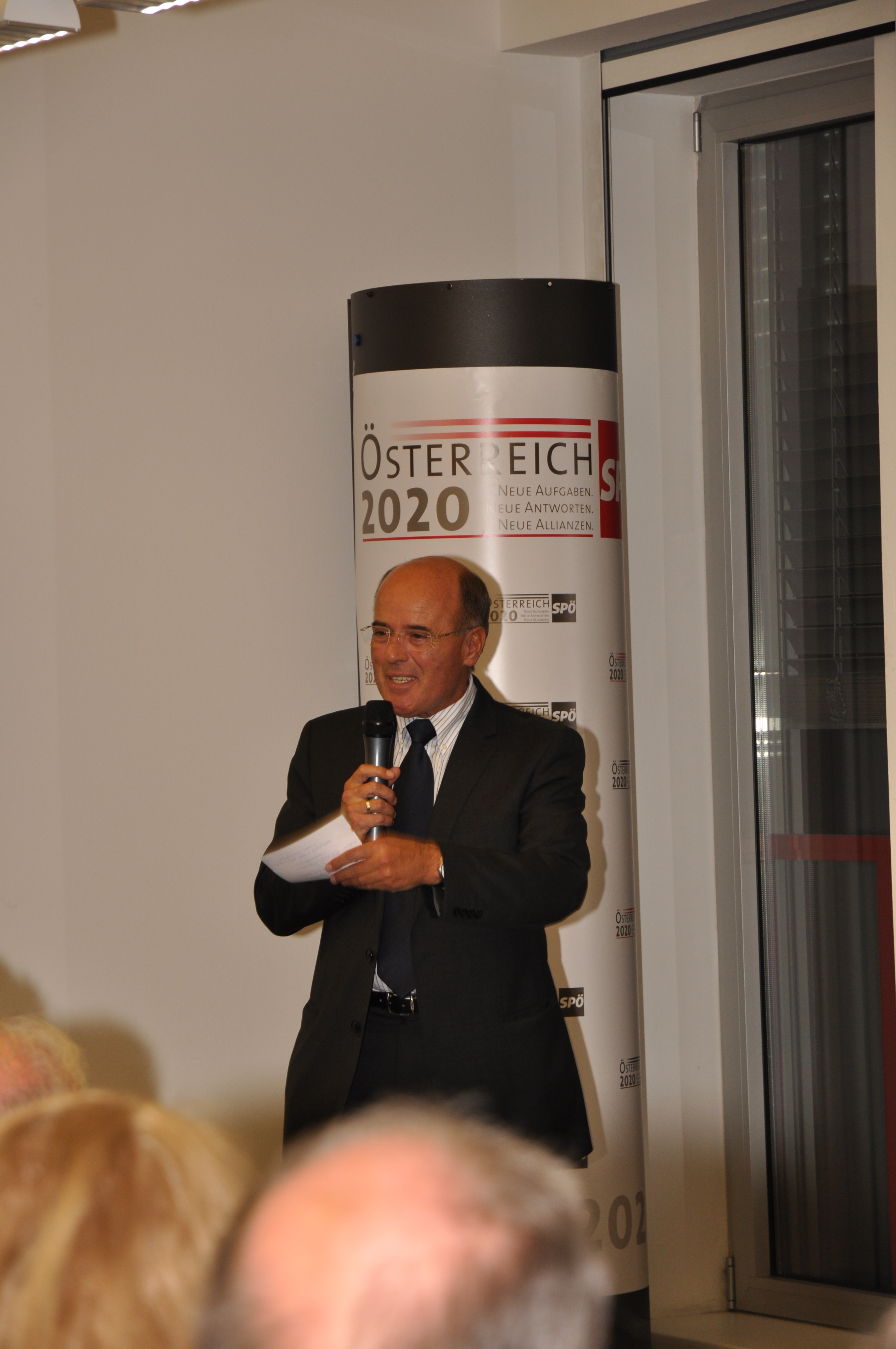 Foto: SPÖ OÖ